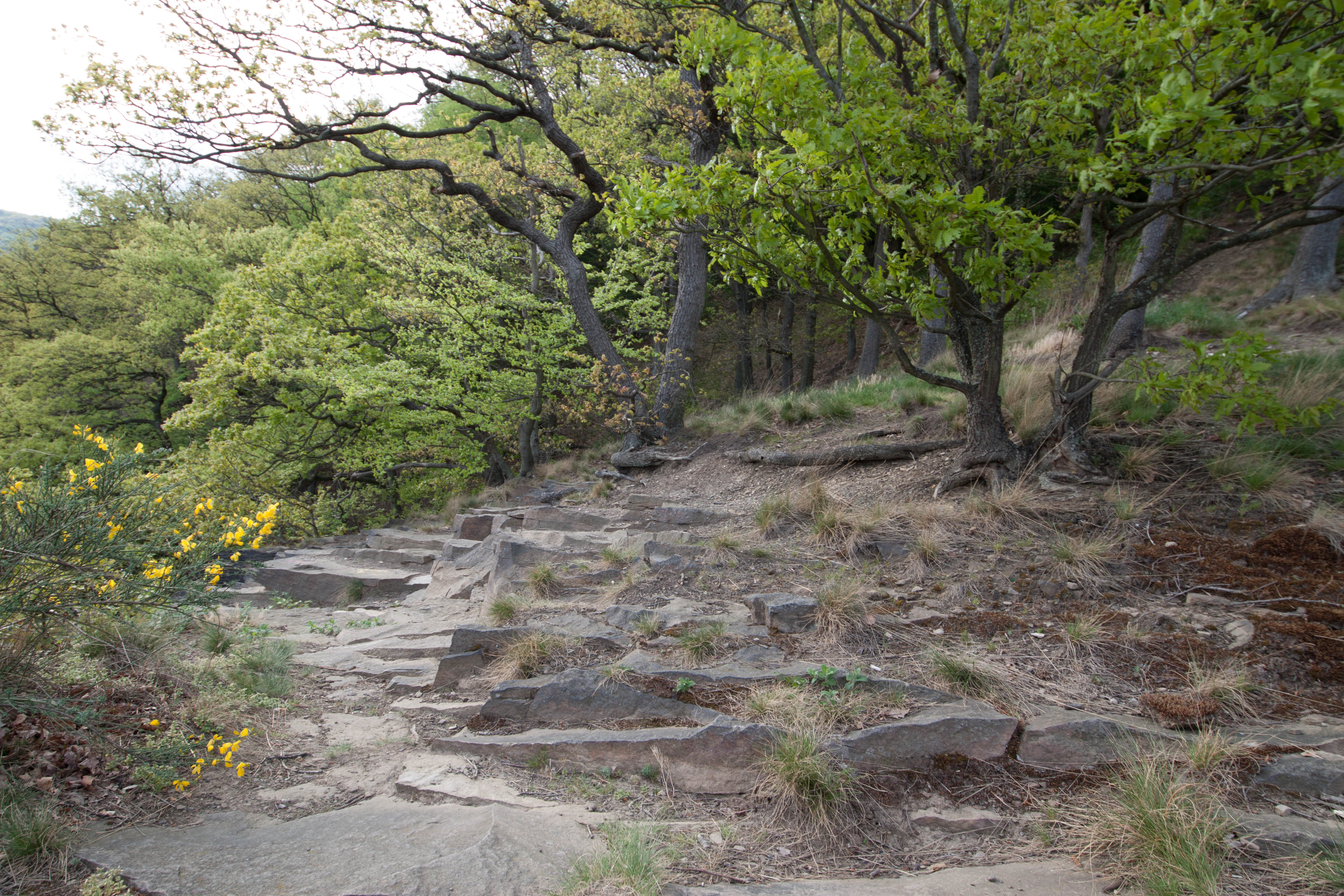 Typische Miniflora an den Ruhrsteilhängen mit kleinen Eichen, Gras und Ginster. Naturschutzgebiet „Ruhrsteilhänge“ (NSG DO-018), Dortmund-Syburg, Regierungsbezirk Arnsberg, NRW.